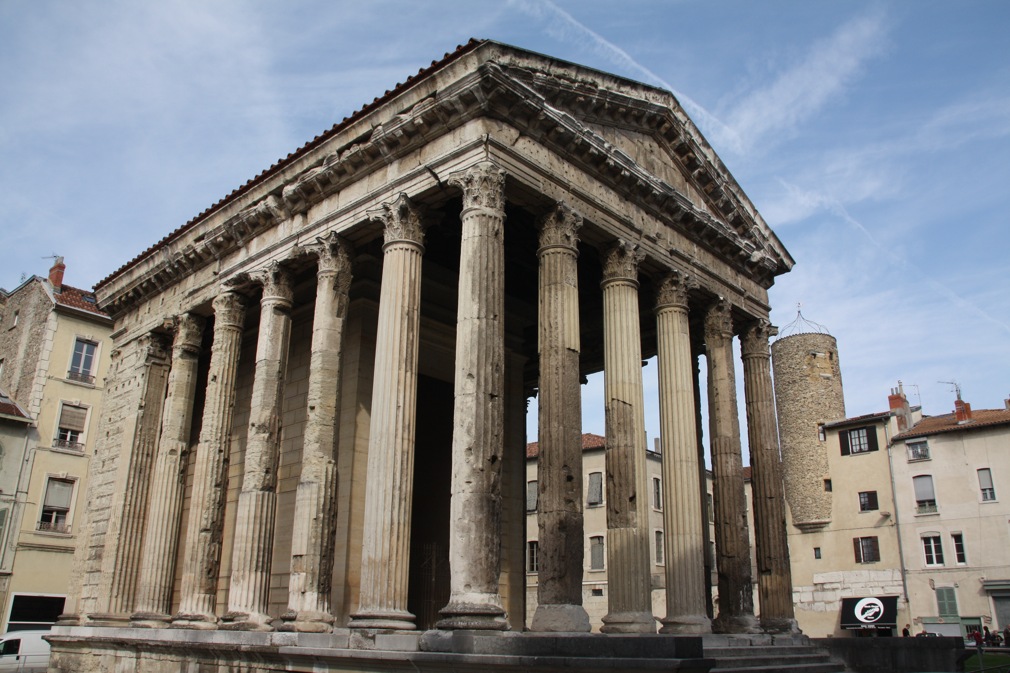 Temple d'Auguste et de Livie à Vienne, Isère, France .